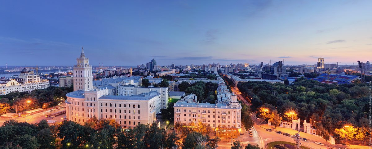 Главное здание управления ЮВЖД